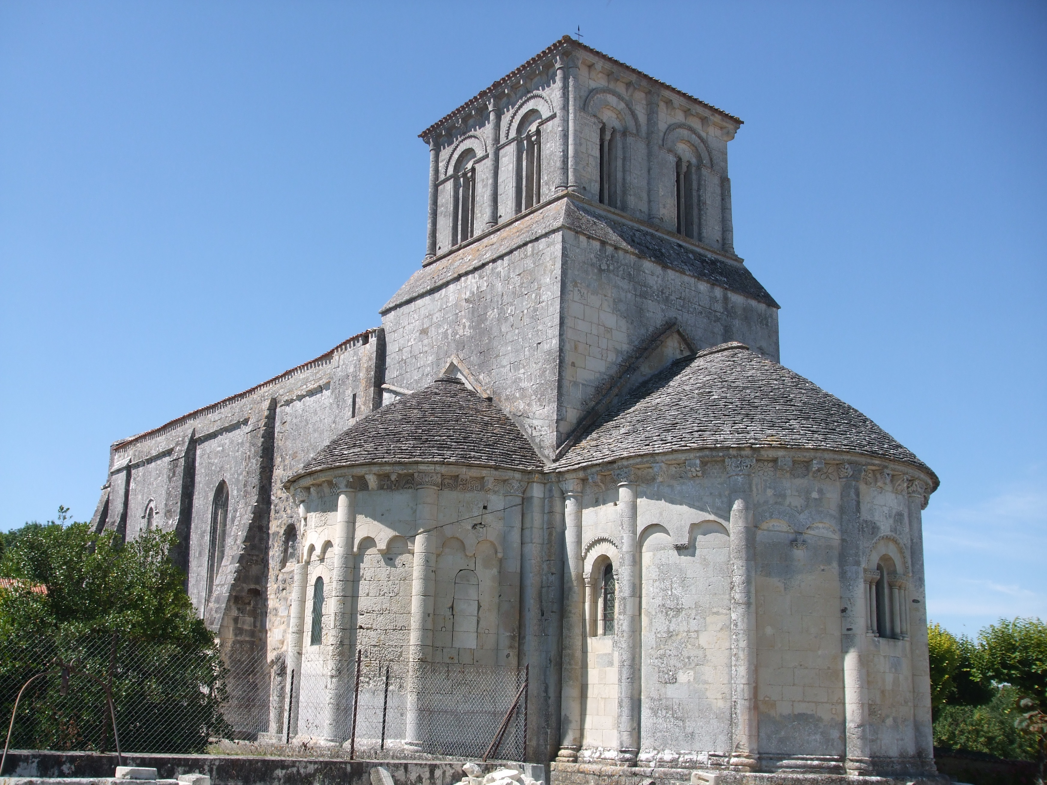 Église Saint-Sulpice de Marignac, (Classé, 1896) .